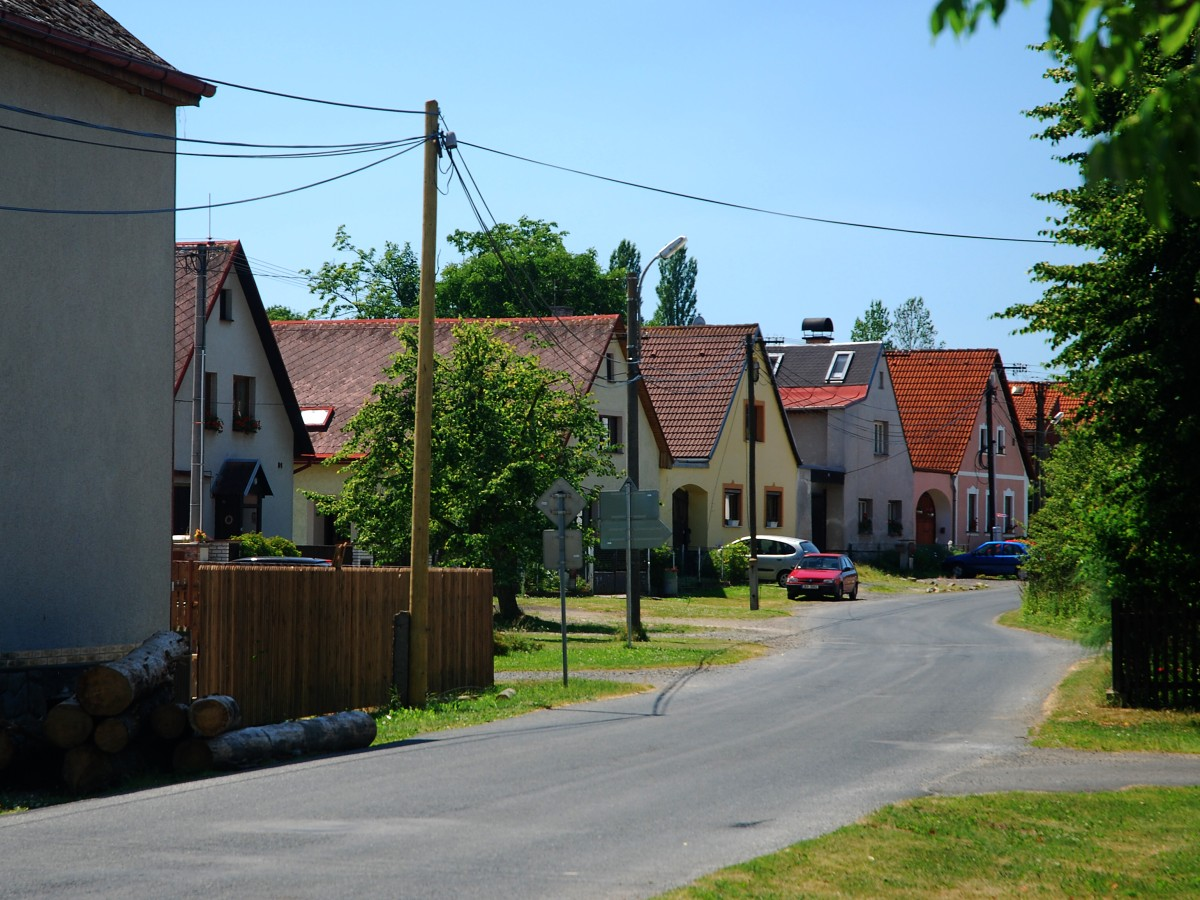 Částkov